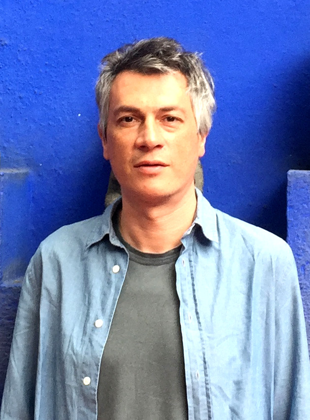 Crédits : Abel Nahmias - 2015